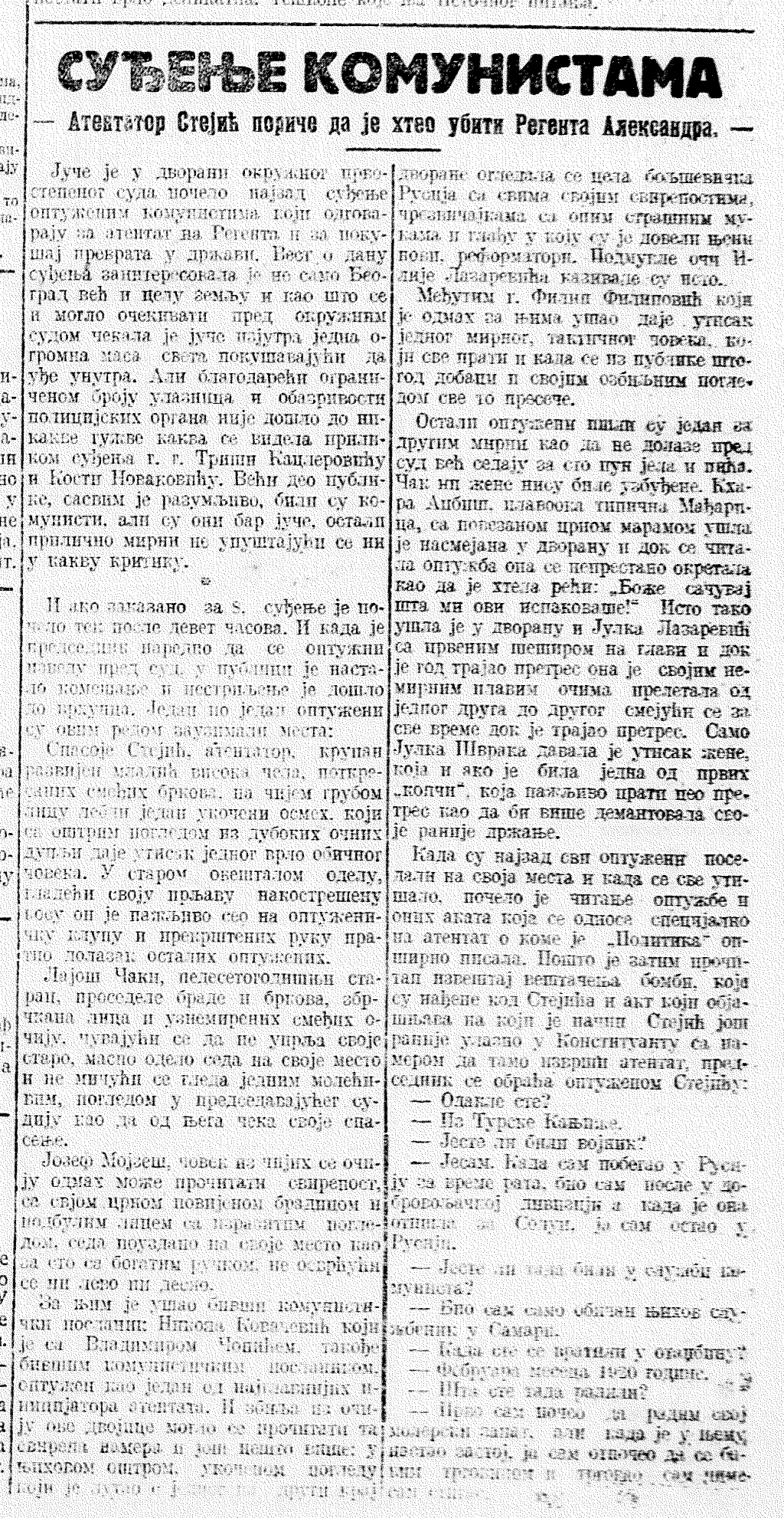 Srpskohrvatski / српскохрватски: Detalj naslovnice Politike o suđenju komunistima, 26. januara 1922.